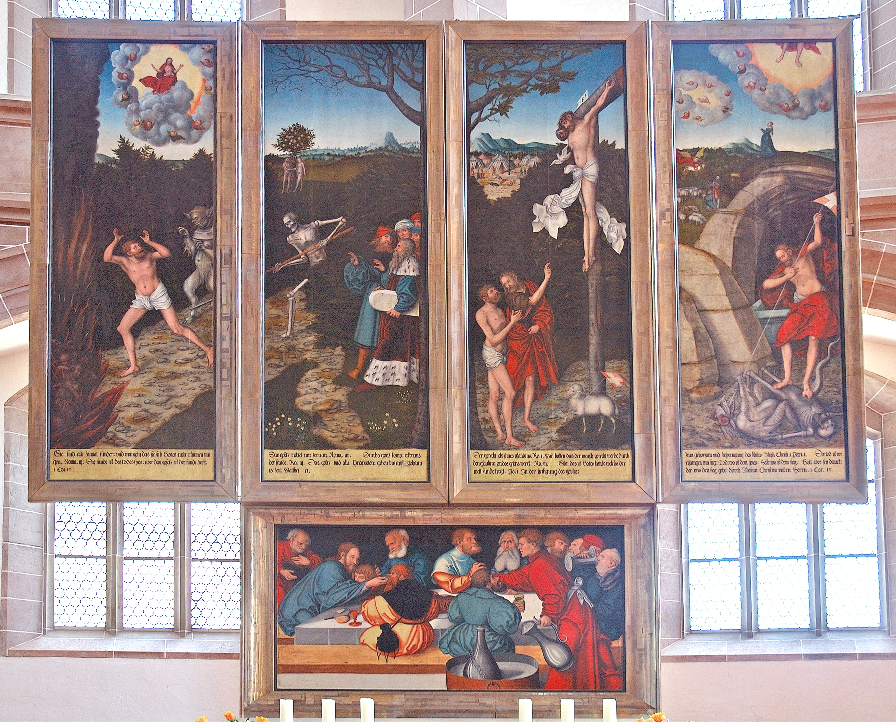 Retabel an der St. Wolfgangskirche zu Schneeberg a Sachsen.